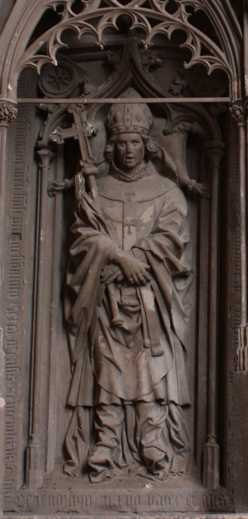 Grabplatte des Mainzer Erzbischofes Adolf II. von Nassau (*um 1423 † 1475) (Nr. 56) in der Basilika des Klosters Eberbach im Rheingau. Hochrelief des toten Adolfs II. in Ornat mit Mitra und Stabkreuz auf einem Kissen ruhend. Die Grabplatte bedeckte ursprünglich ein freistehendes Tumbengrab bevor sie 1707 in das umgestaltete Grab Gerlachs von Nassau integriert wurde. (Quelle: Yvonne Monsees: Grabmäler im Kloster Eberbach, Freundeskreis Kloster Eberbach e.V. 2009, ISBN 978-3-00-027060-4